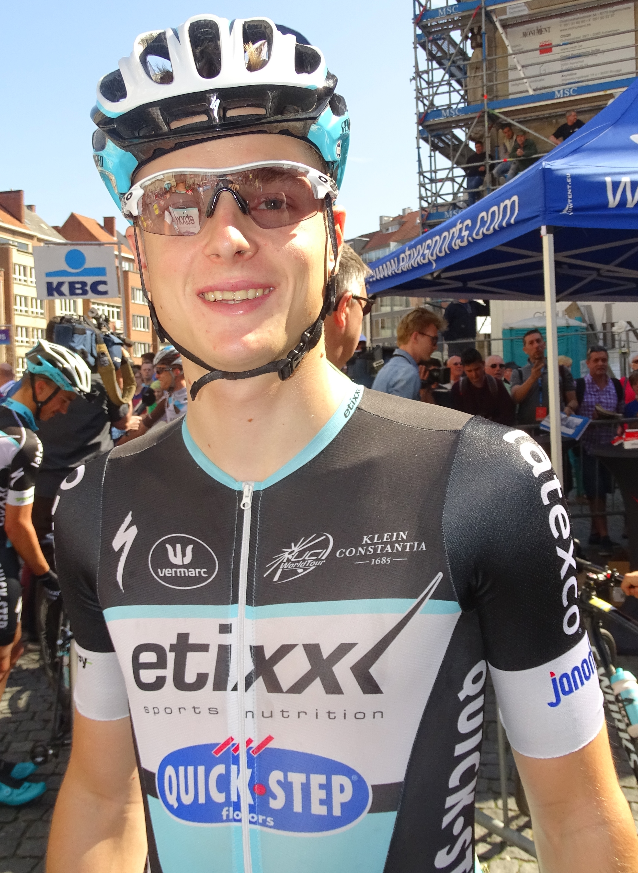 Reportage réalisé le mercredi 15 avril à l'occasion du départ de la Flèche brabançonne 2015 à Louvain, Belgique.